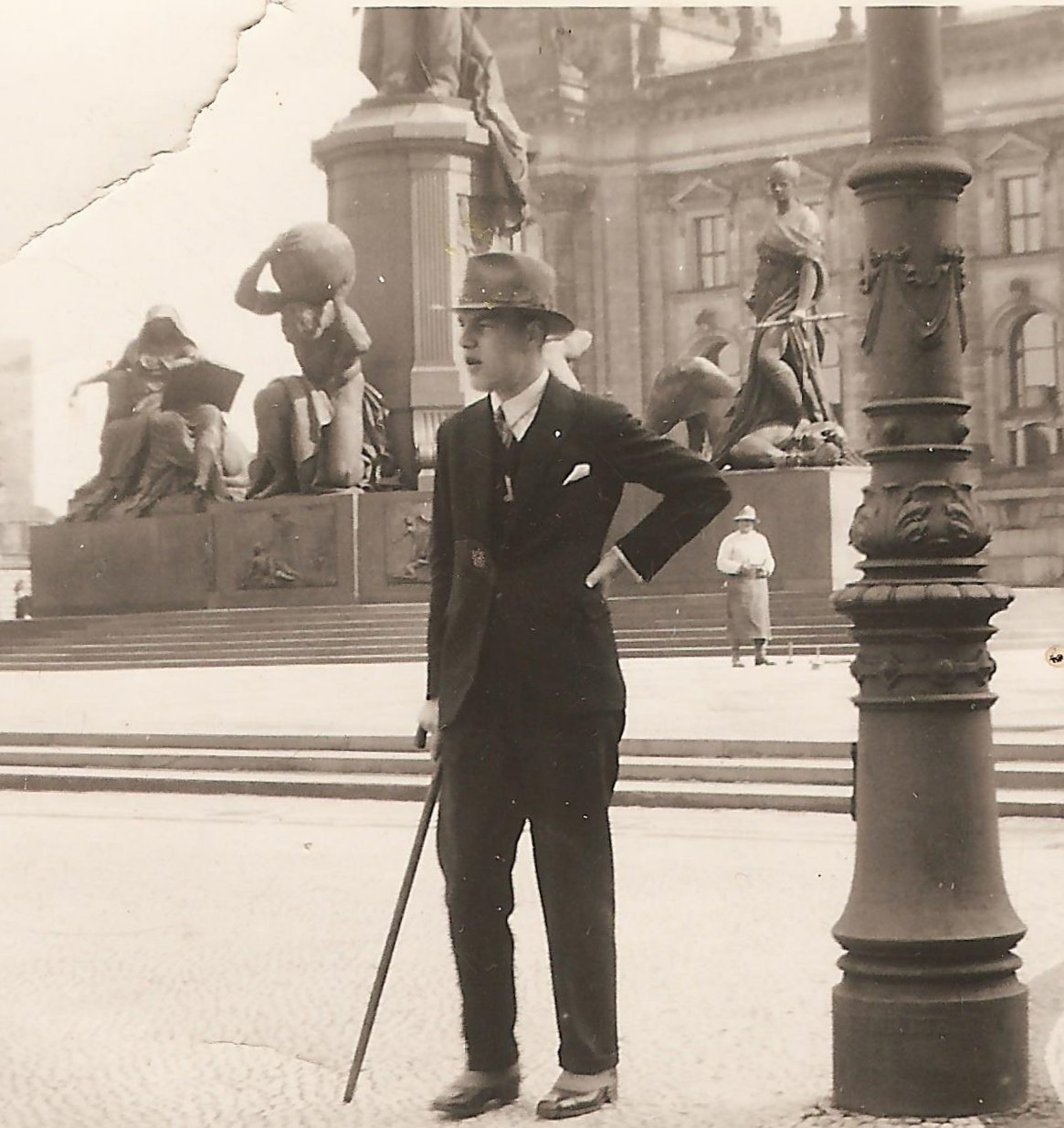 Conrad Baden als Student in Leipzig 1931